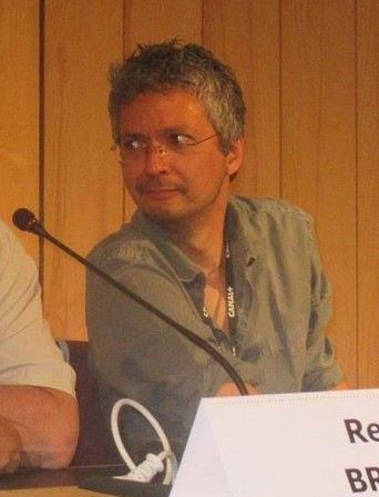 Pierre Coffin au festival international du film d'animation d'Annecy